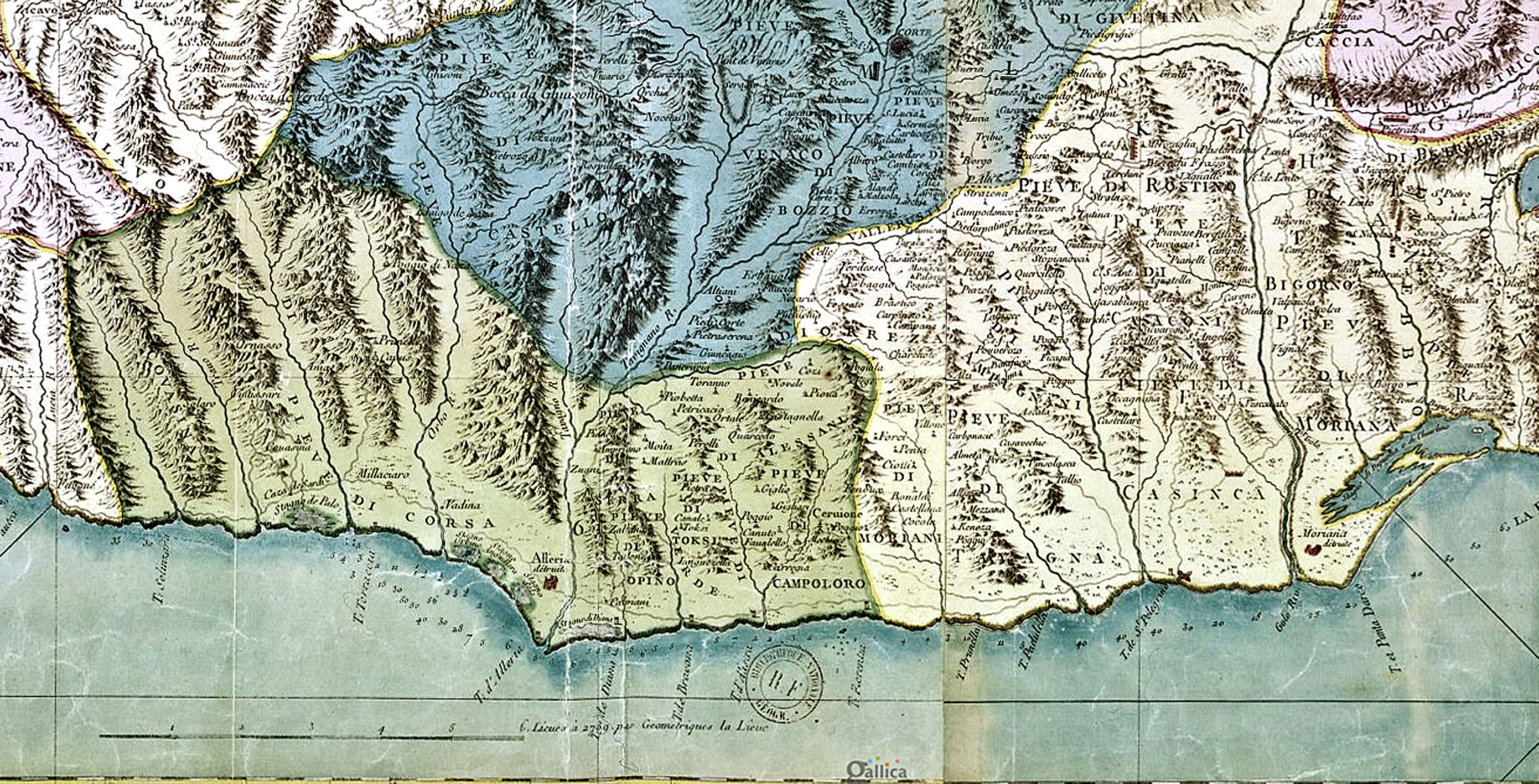 Extrait de la carte militaire concernant la Plaine orientale de Corse, en 1768 - Sont marquées toutes les paroisses et tous les principaux hameaux de chaque pieve / rectifiée en l'année 1740, suivant les ordres de Monsieur le marquis de Maillebois